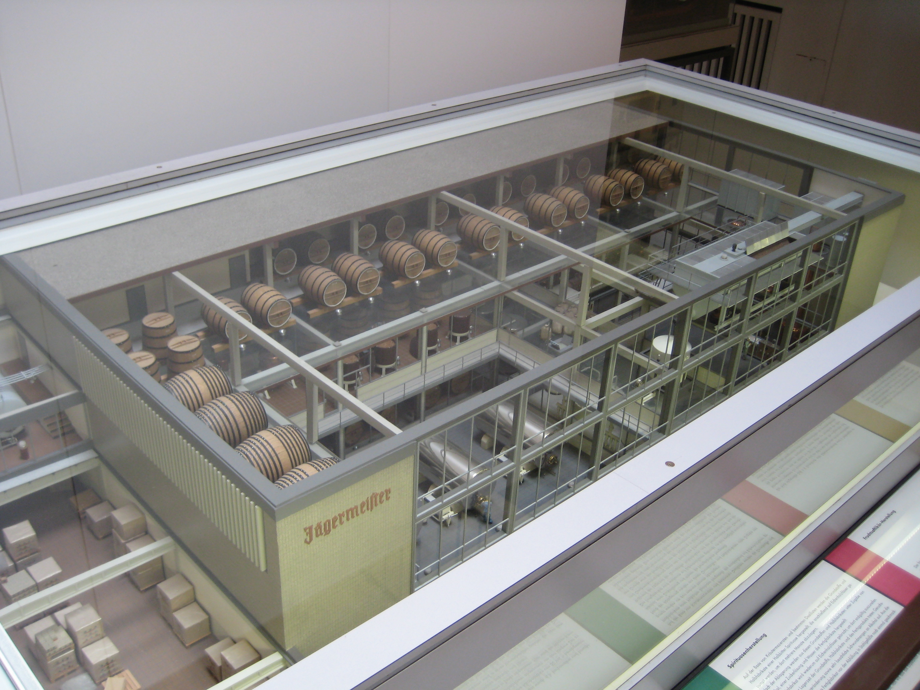 Jägermeister distillery model.